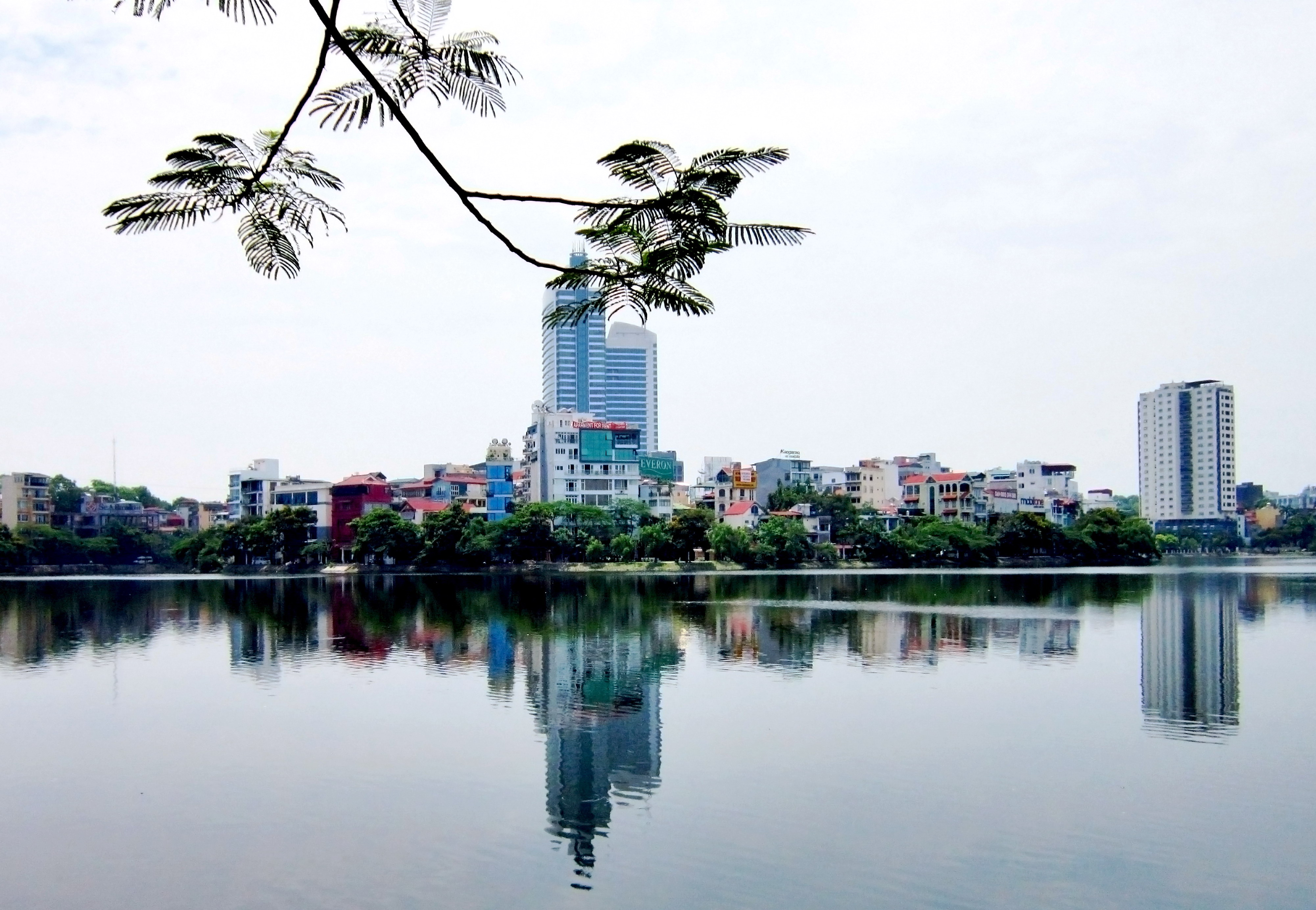 Phong cảnh Hồ Tây ở Hà Nội, Việt Nam.